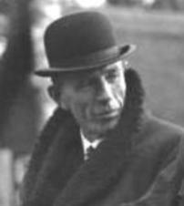 Lord [Edward Frederik ]Halifax bei Göring in der Schorfheide 20.11.37